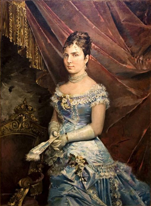 Retrato de la reina María de las Mercedes de Orleans (1860-1878), que fue la primera esposa del rey Alfonso XII de España.